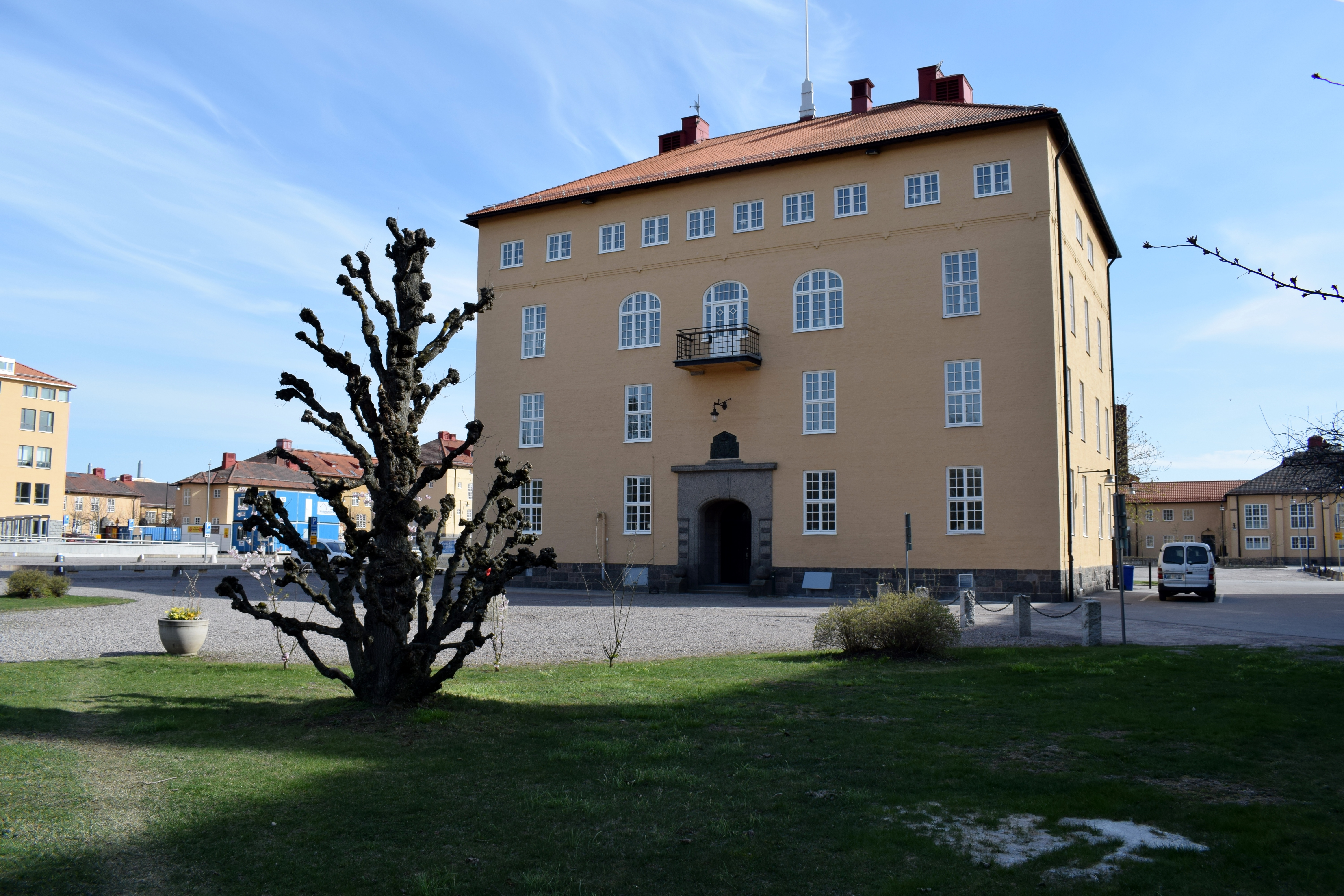 Kanslihuset vid västra delen av dubbelkasernetablissementet i Linköping. Kanslihuset uppfördes ursprungligen för Andra livgrenadjärregementet 1922–1927. Åren 1928–1997 var staben för Livgrenadjärregementet lokaliserad till kanslihuset.